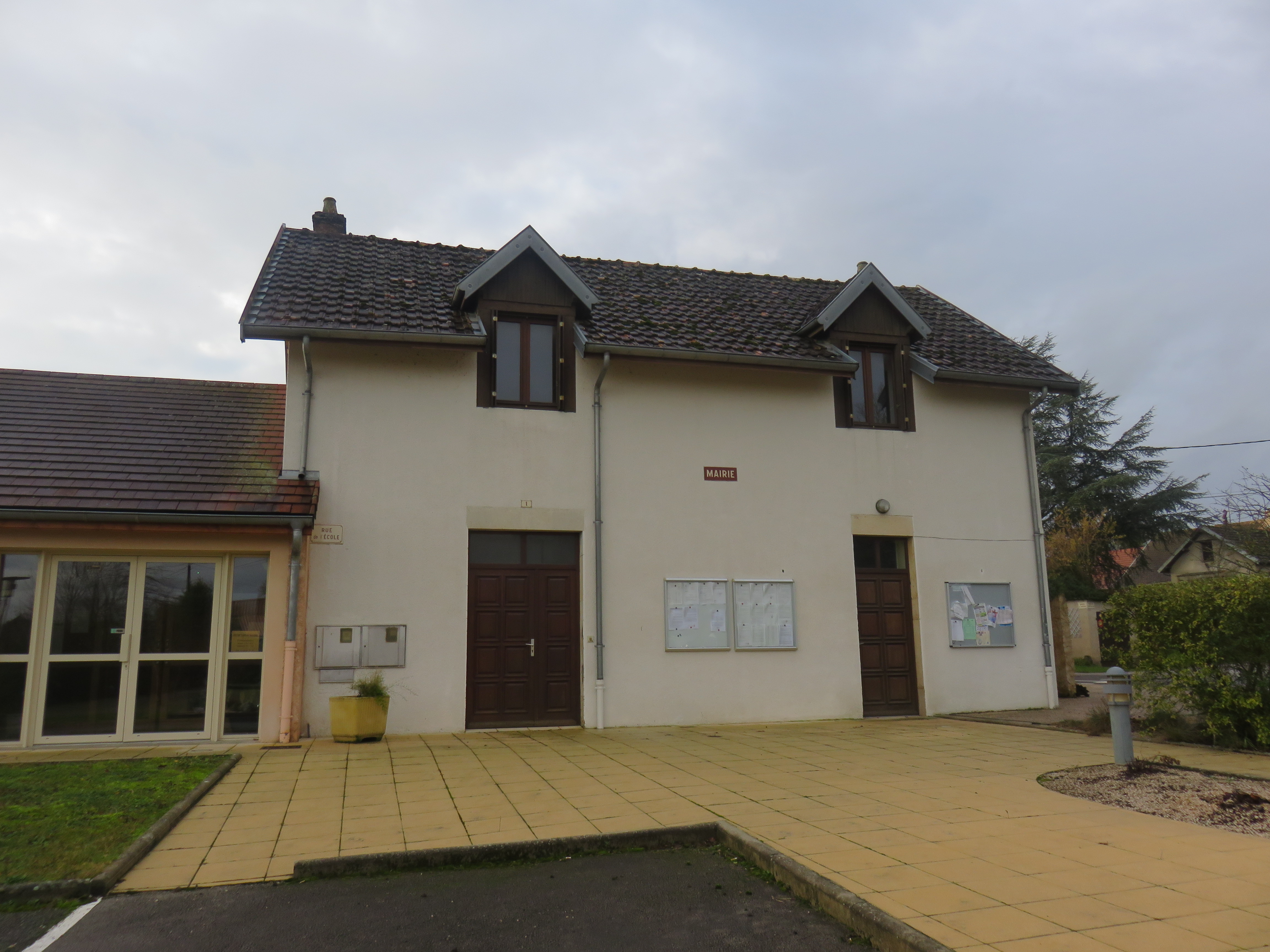 Bans (Jura, France) en janvier 2018.